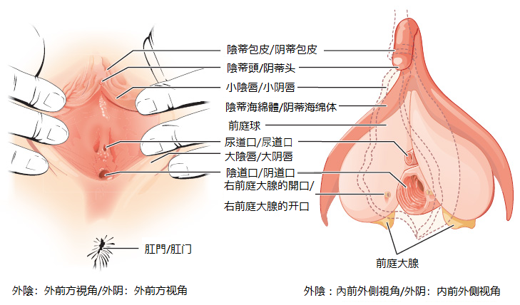 中文（香港）: 外陰的各部分位置及名稱